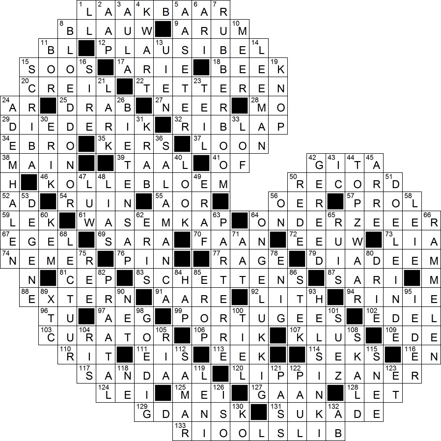 voorbeeld van een woordpuzzel